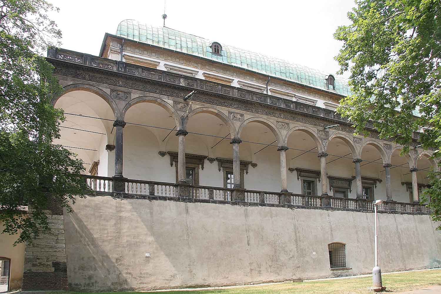 Letohrádku královny Anny, Prague Castle, Autor:Prazak Date: 27. 7. 2006